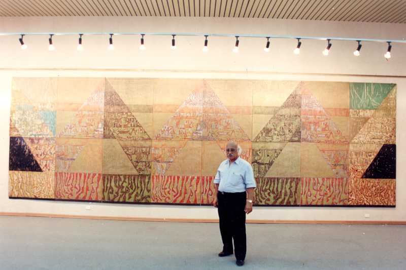 HUSSEIN EL GEBALY WITH HIS LARGE ART WORK